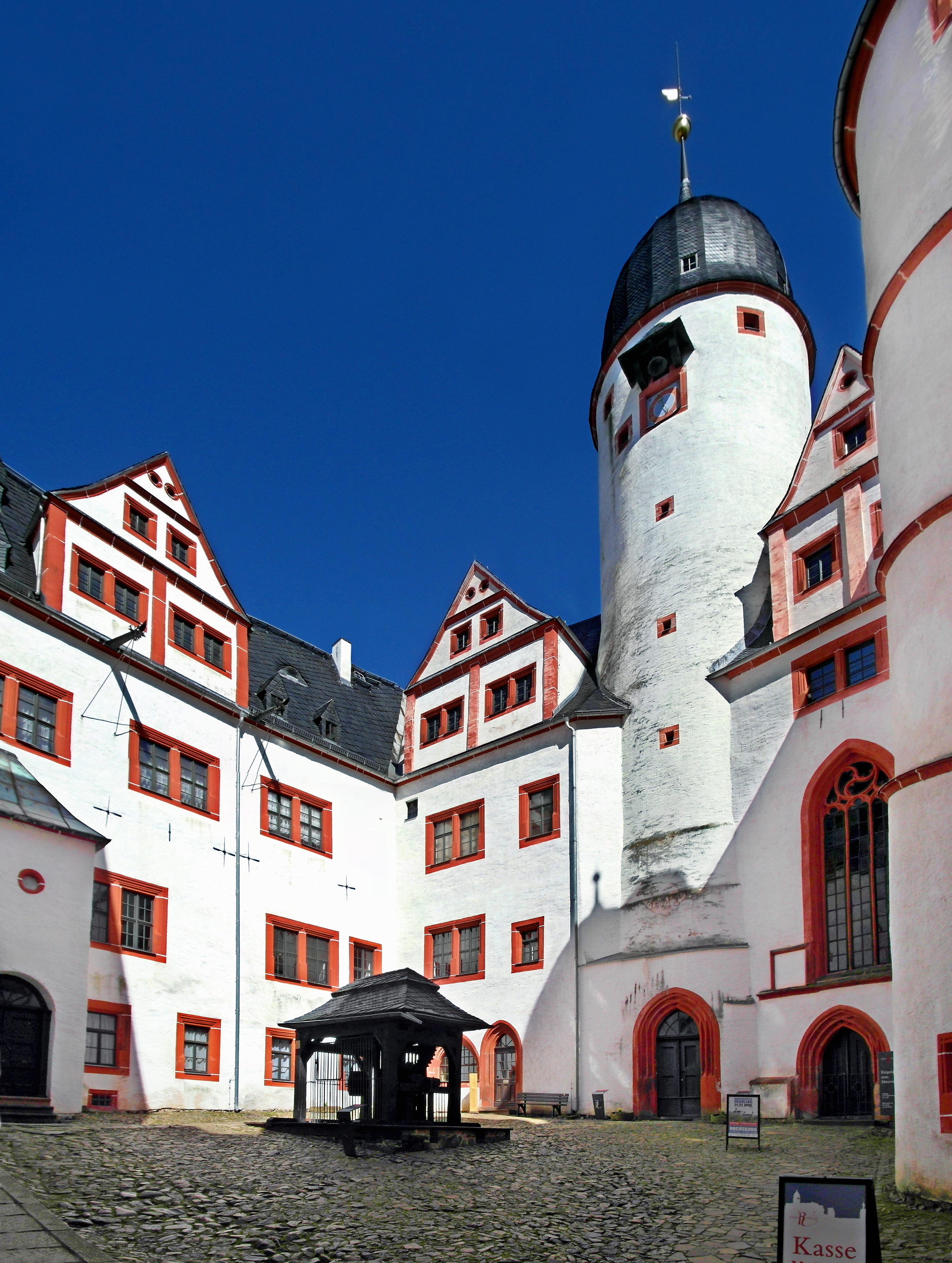 06.04.2018 09328 Rochsburg (Lunzenau): Schloß Rochsburg, Schloßstraße 1 (GMP: 50.943885,12.764613), wurde um 1170 als Burg gegründet. Ab 1470 erfolgte unter Hugold von Schleinitz der Umbau zum Schloß. Heute Museum und einschließlich der Schloßkapelle "St. Anna" zu besichtigen. Hier der obere Schloßhof mit dem Brunnen. Blick nach Nordosten. Rechts das gotische Fenster der Schloßkapelle. [SAM4968+4971.JPG]20180406300MDR.JPG(c)Blobelt